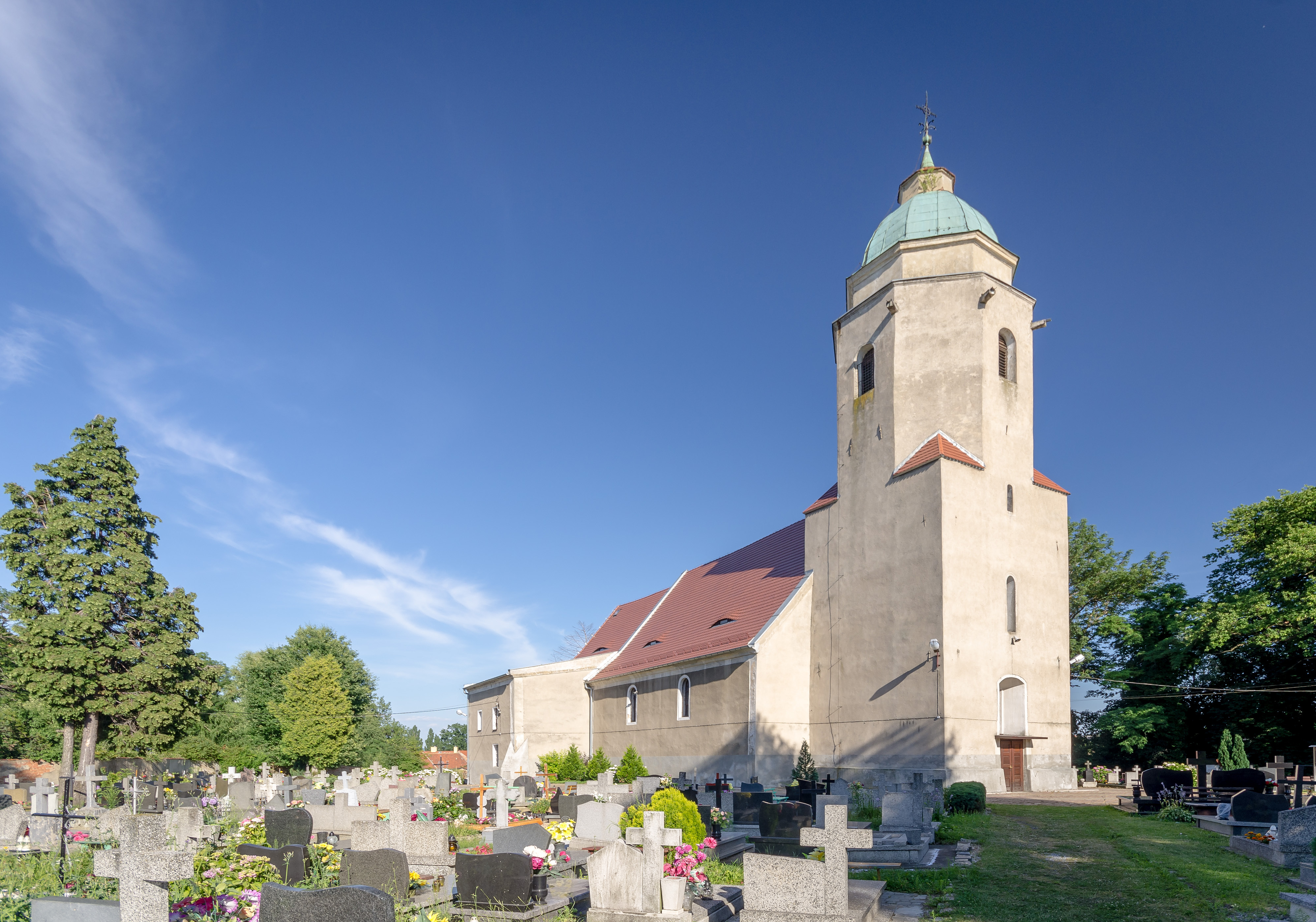 Pieszyce, ul. Kościelna - rzymskokatolicki kościół parafialny p.w. św. Jakuba, XV, XVIII You can see all photographs in category Wikiekspedycja 2013.